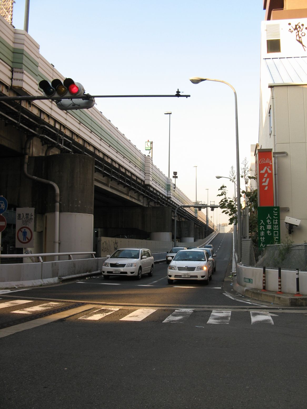 阪神高速ja:道頓堀出口 北望